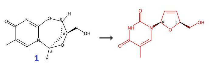 Réaction retrouvée grâce au site scifinder.